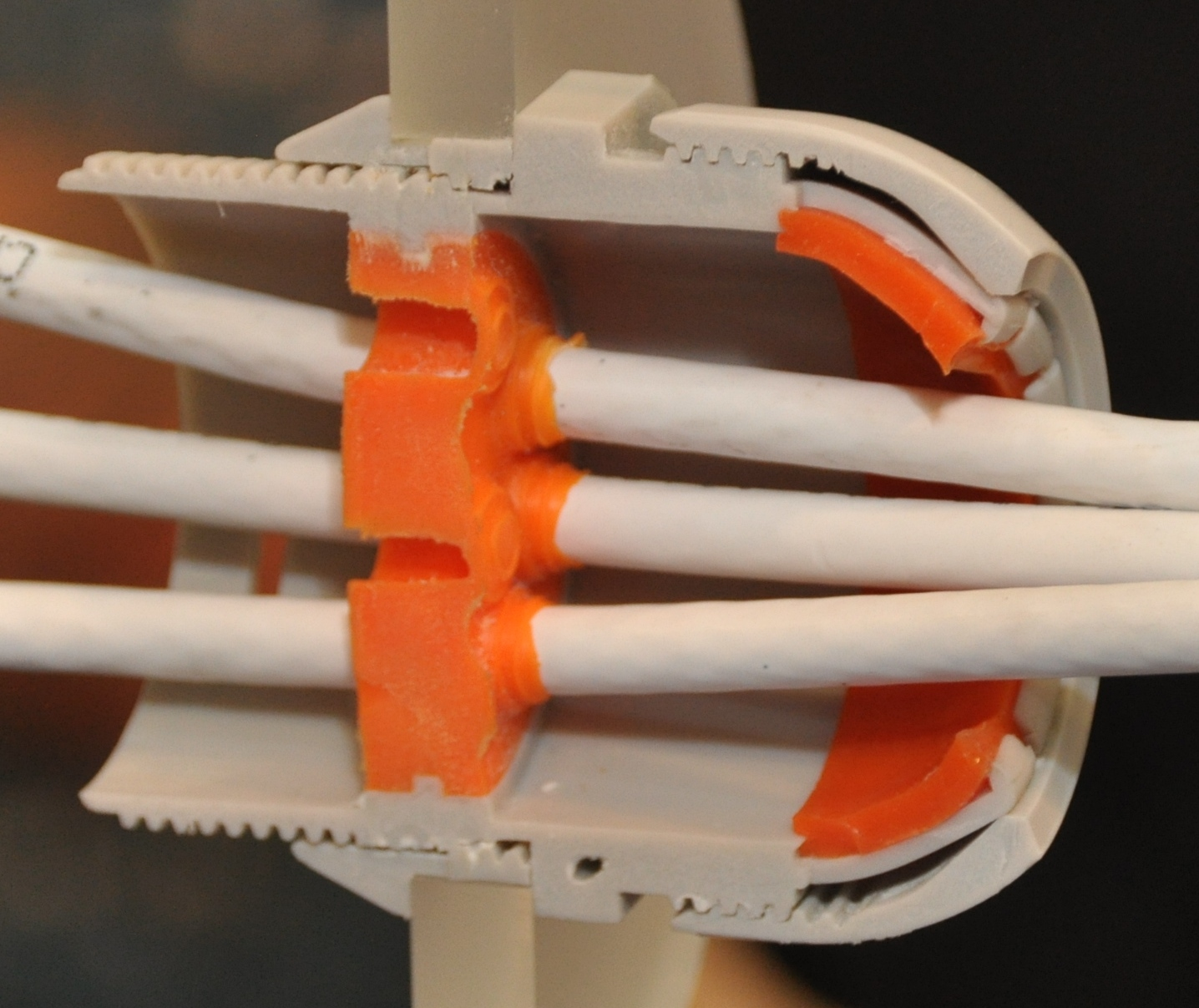 Scheepsmaterialen op de METS 2011 in de RAI te Amsterdam